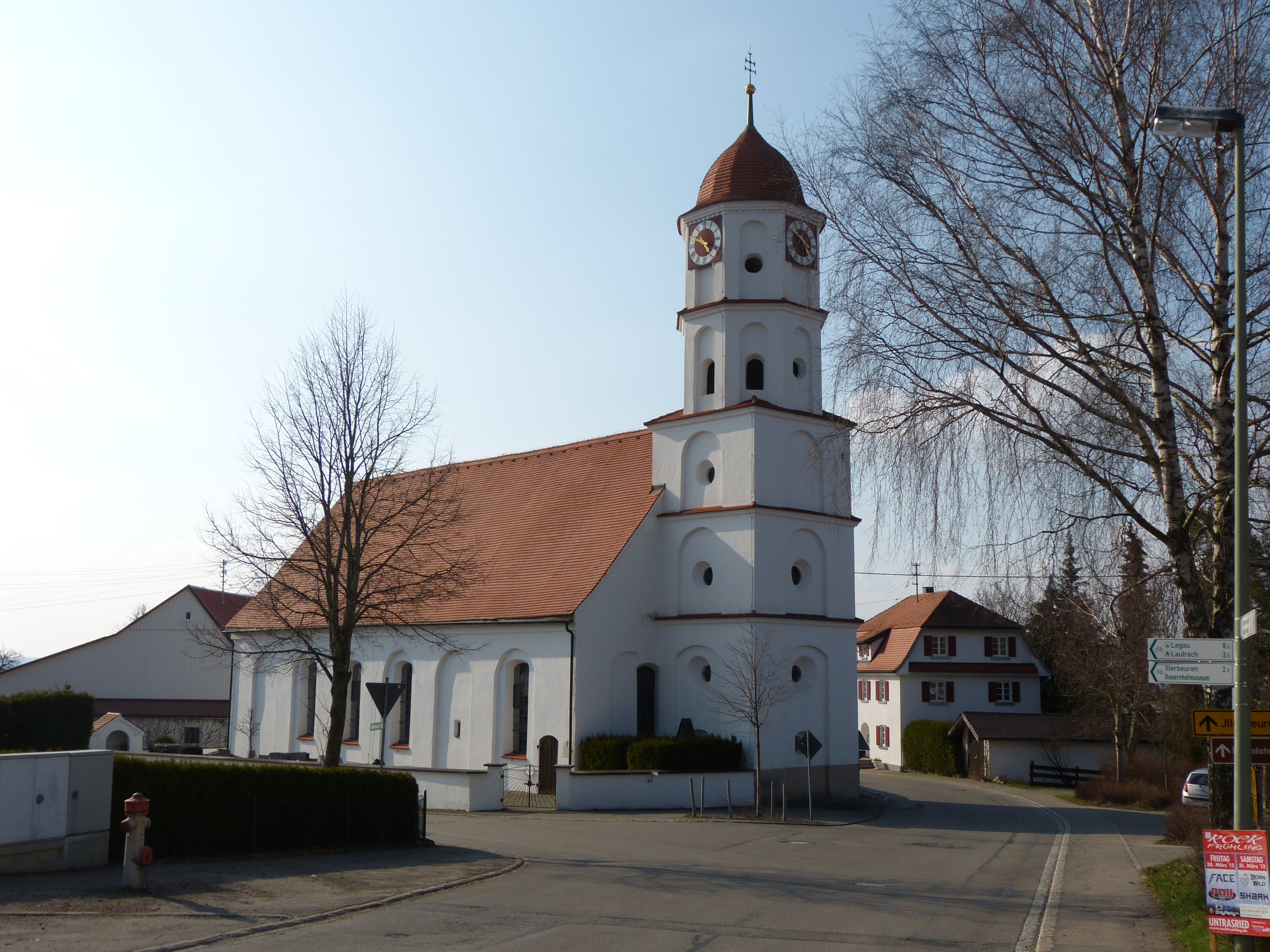 Heiligste Dreifaltigkeit Kronburg, Landkreis Unterallgäu, Bayern